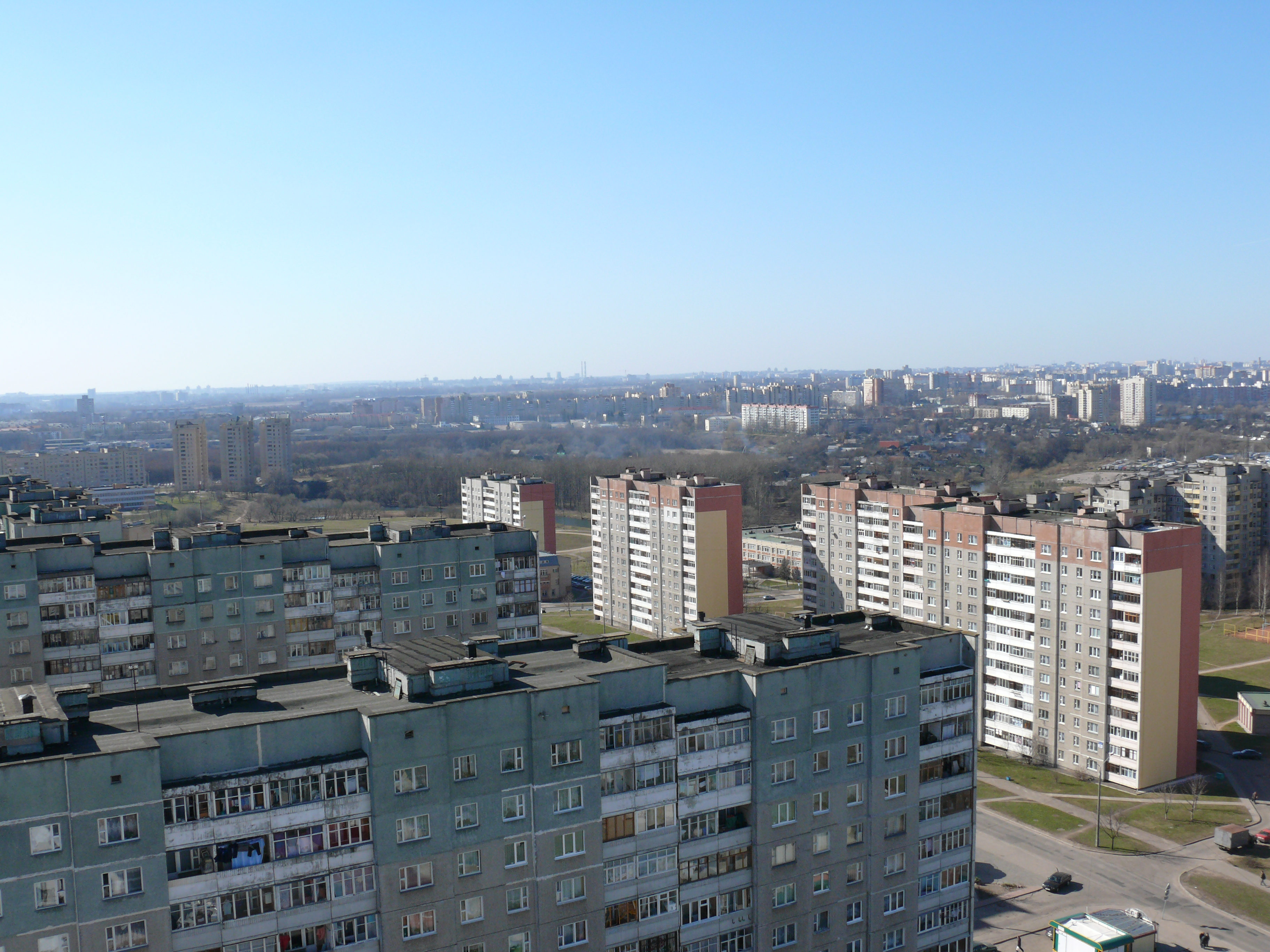 پښتو: Minsk Belaruss